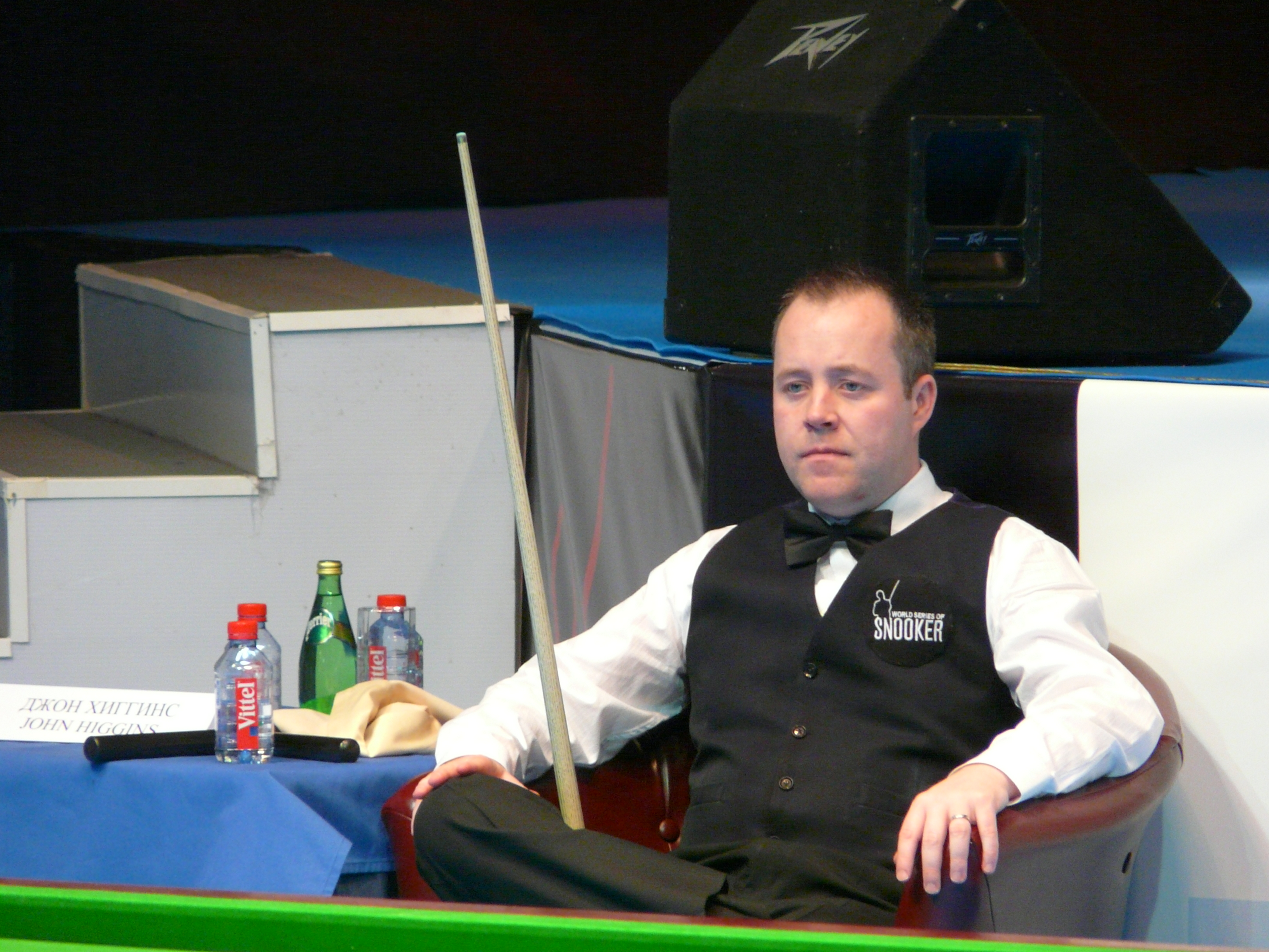 Туринир World Series of Snooker в Москве